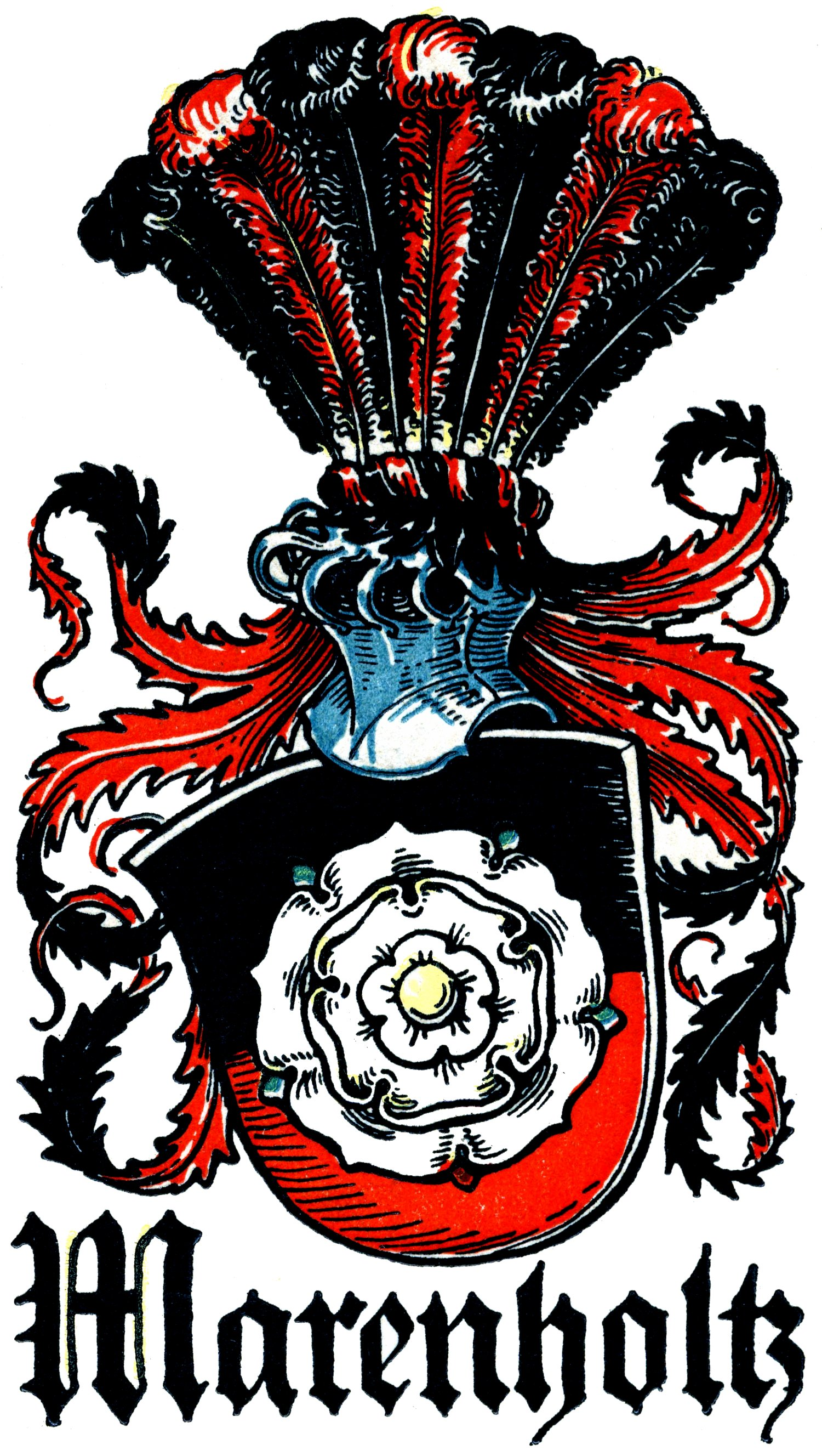 Wappen derer von Marenholtz